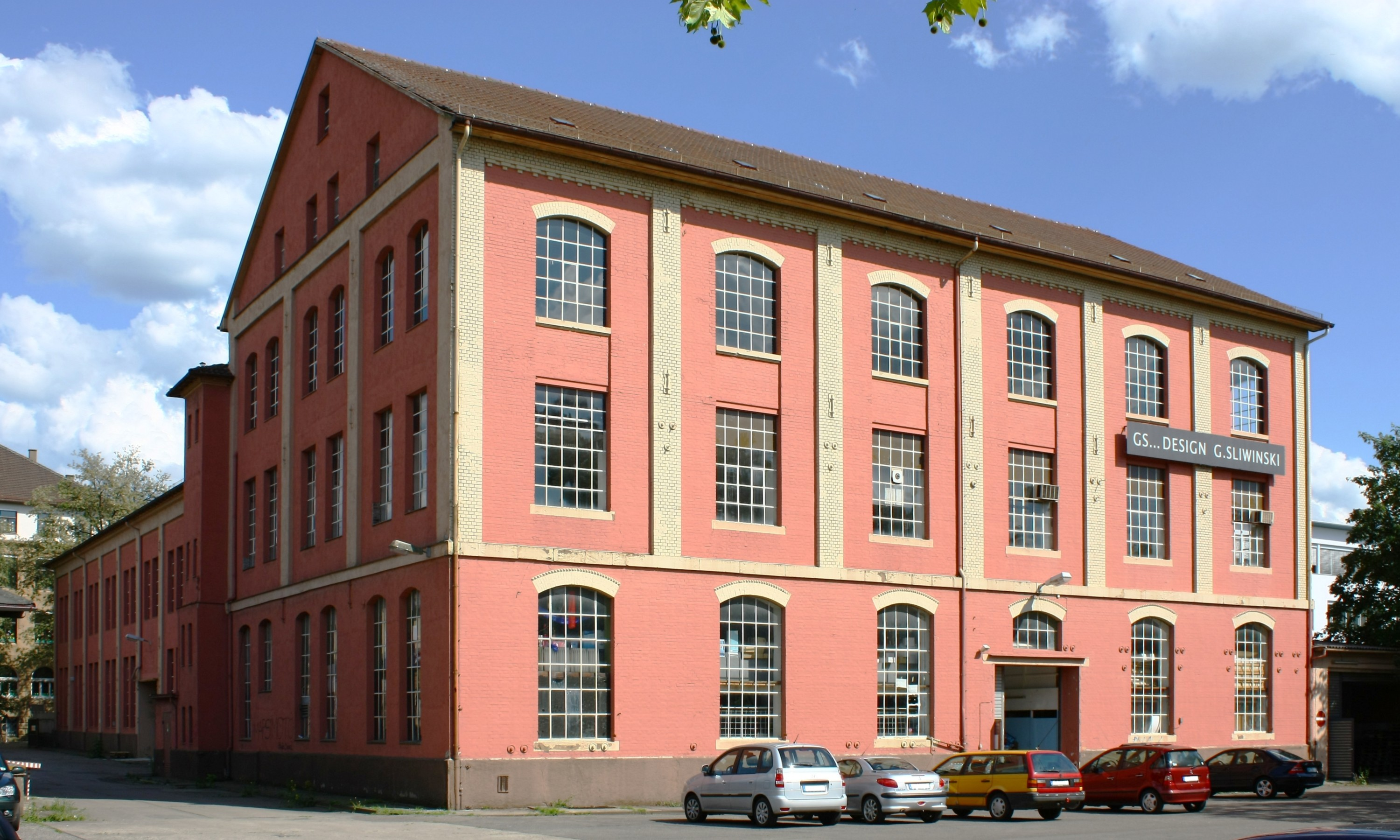 Das letzte noch vorhandene Gebäude der ehemaligen Papierfabrik Schaeuffelen in Heilbronn, von Nordwesten gesehen